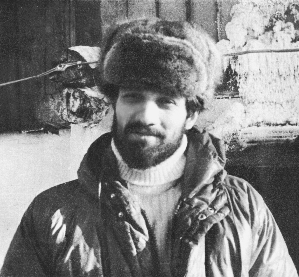 Александр Подрабинек — советский диссидент, российский правозащитник, журналист и общественный деятель.